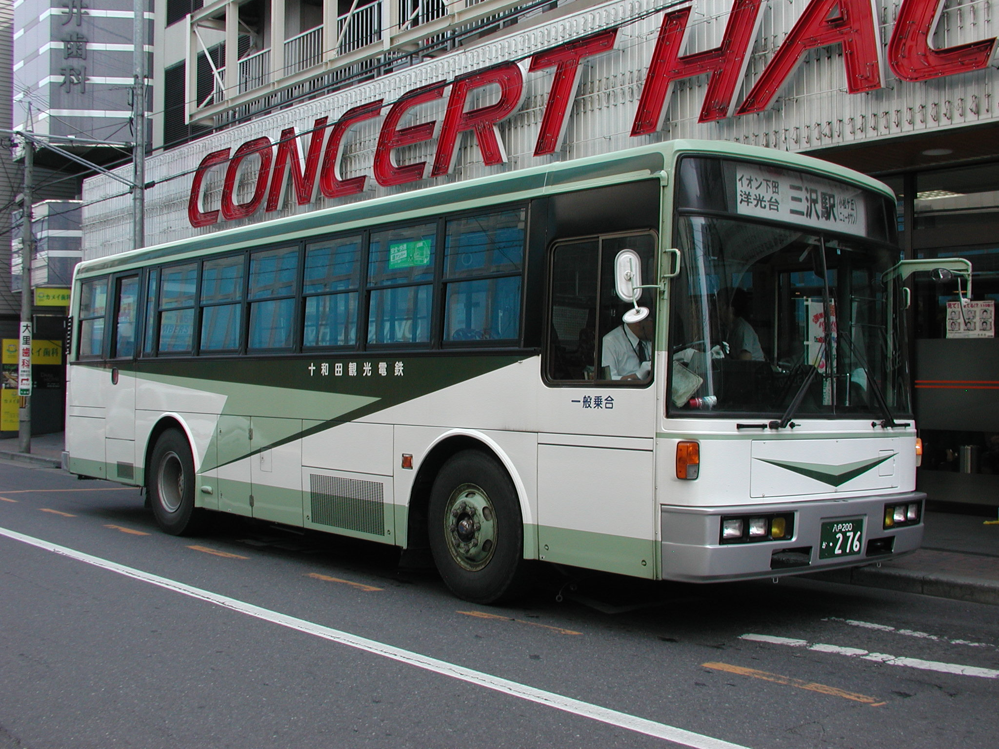 十和田観光電鉄バス 一般路線塗装：国際興業グループカラー（いすゞ・キュービック：U-LV324K：富士重工7E架装車） （三沢案内所所属車） 六日町バス停（八戸市）にて